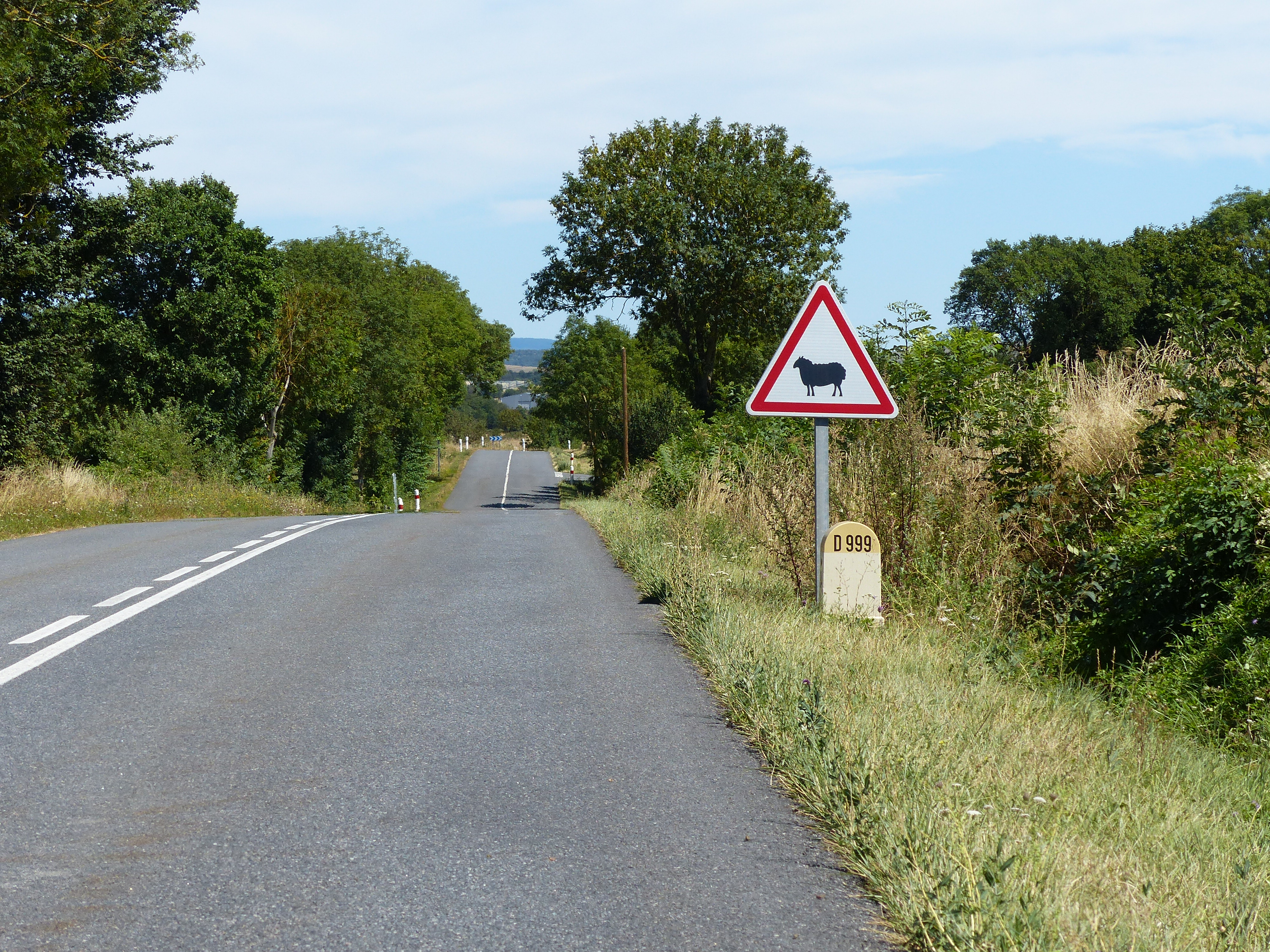 Panneau A15a2 et borne E53a D 999 34 km, Lapanouse-de-Cernon, Aveyron, France.